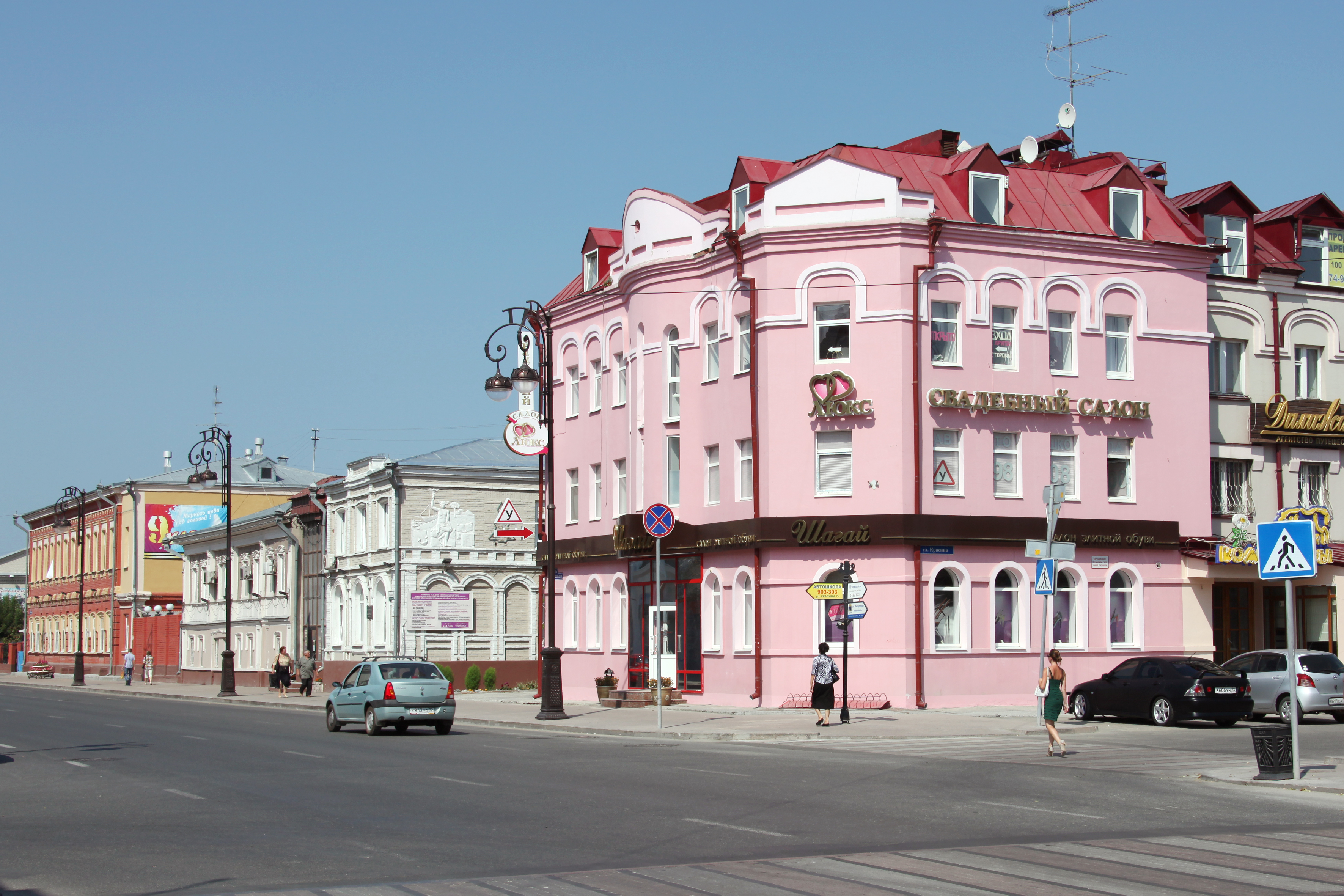 Strato Respubliko. Tjumeno, Rusio.